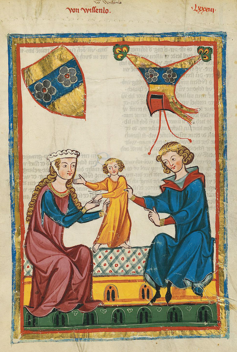 Codex Manesse, UB Heidelberg, Cod. Pal. germ. 848, fol. 299r: Von Wissenlo